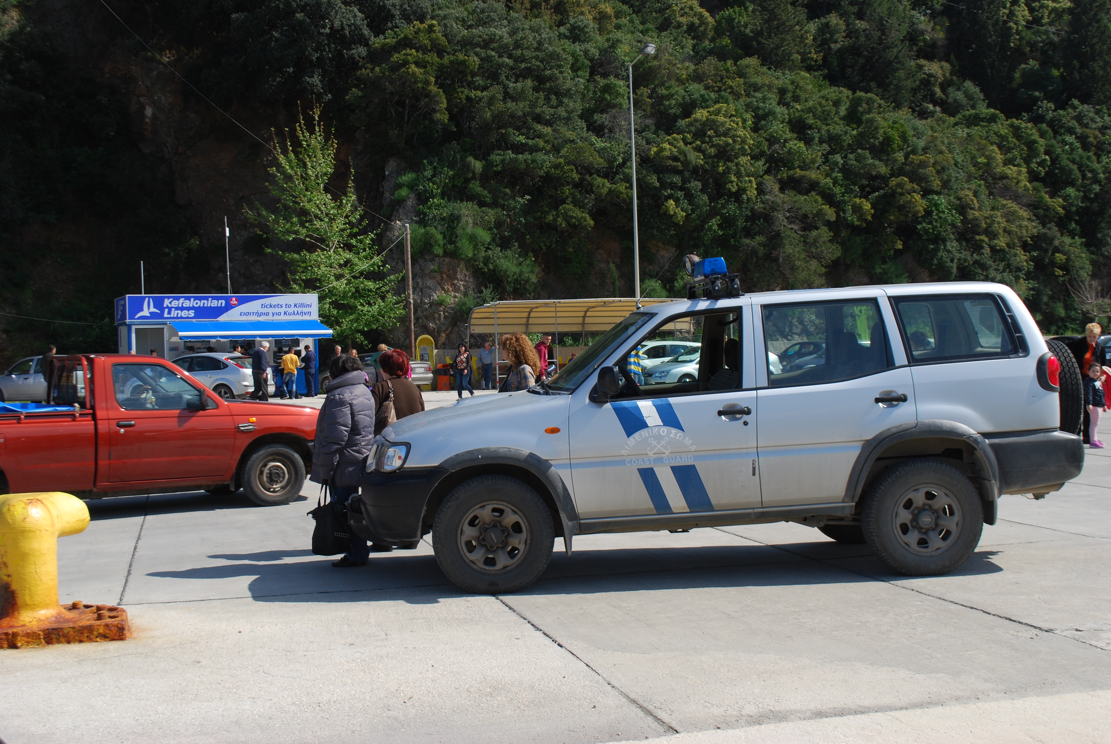 Vue de la traversée entre Kyllini (Péloponnèse) et Poros (Céphalonie, Îles Ioniennes), à bord du "Kephalonia".